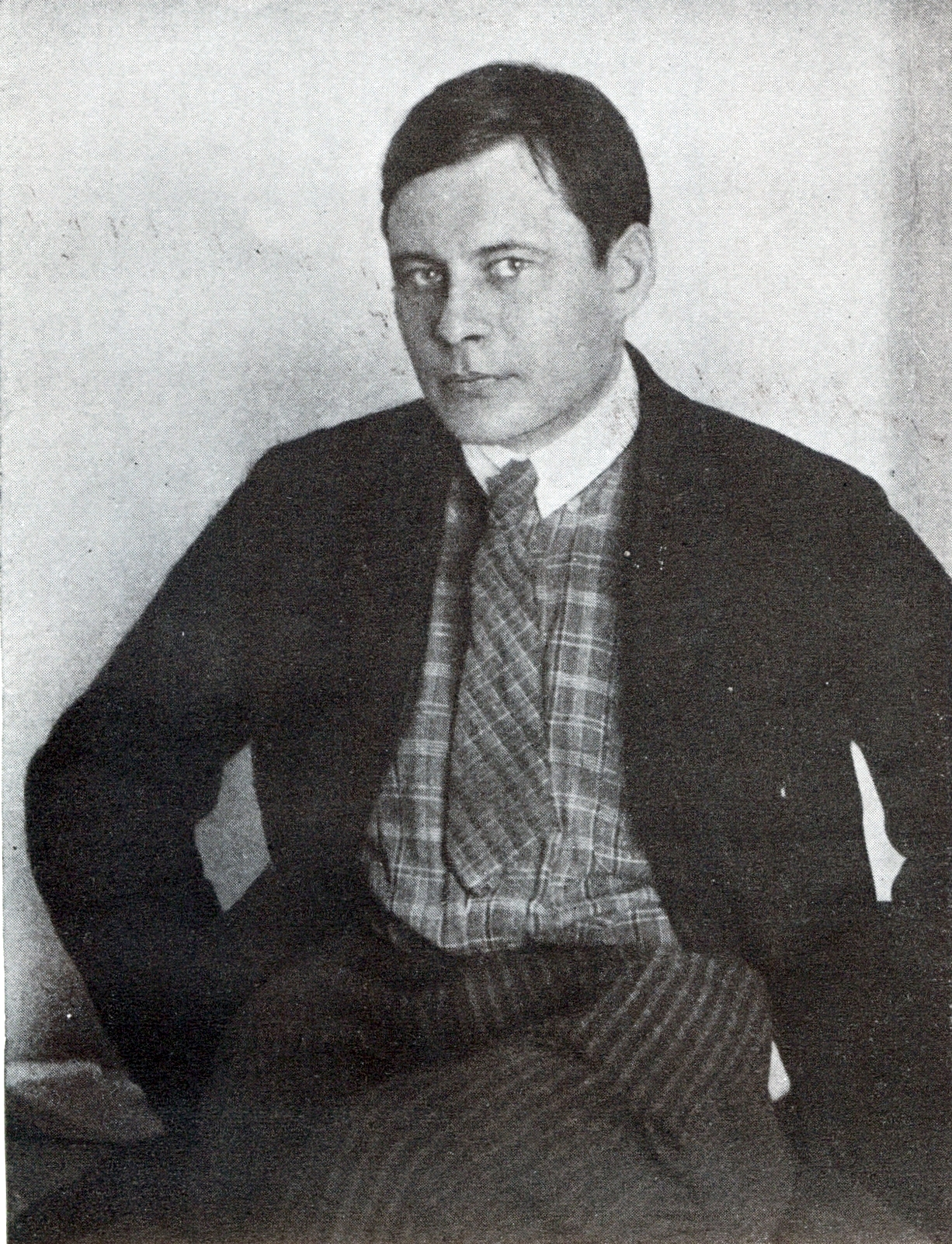 Фотографія Майка Йогансена